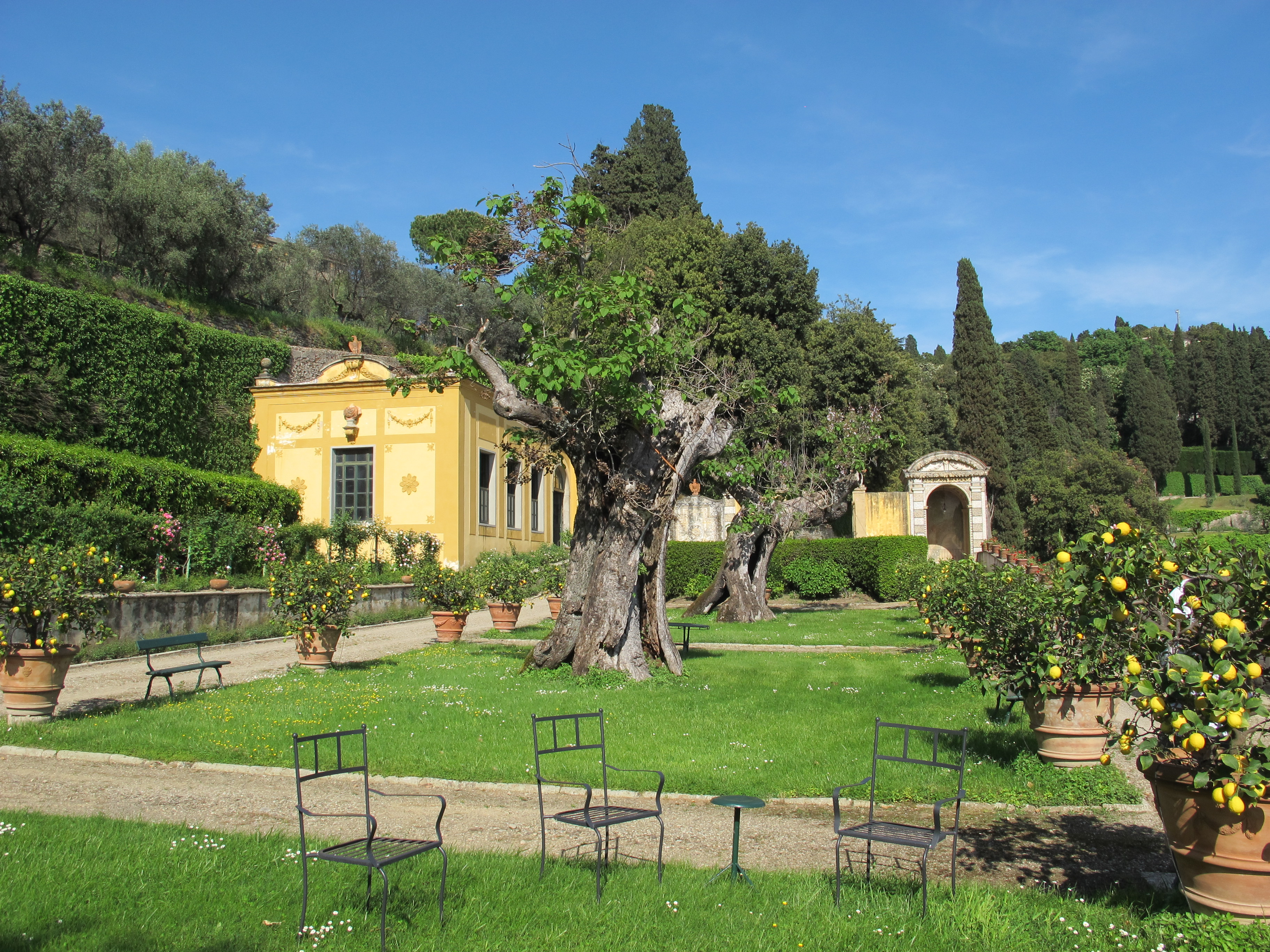 Villa medici di belcanto, prima terrazza